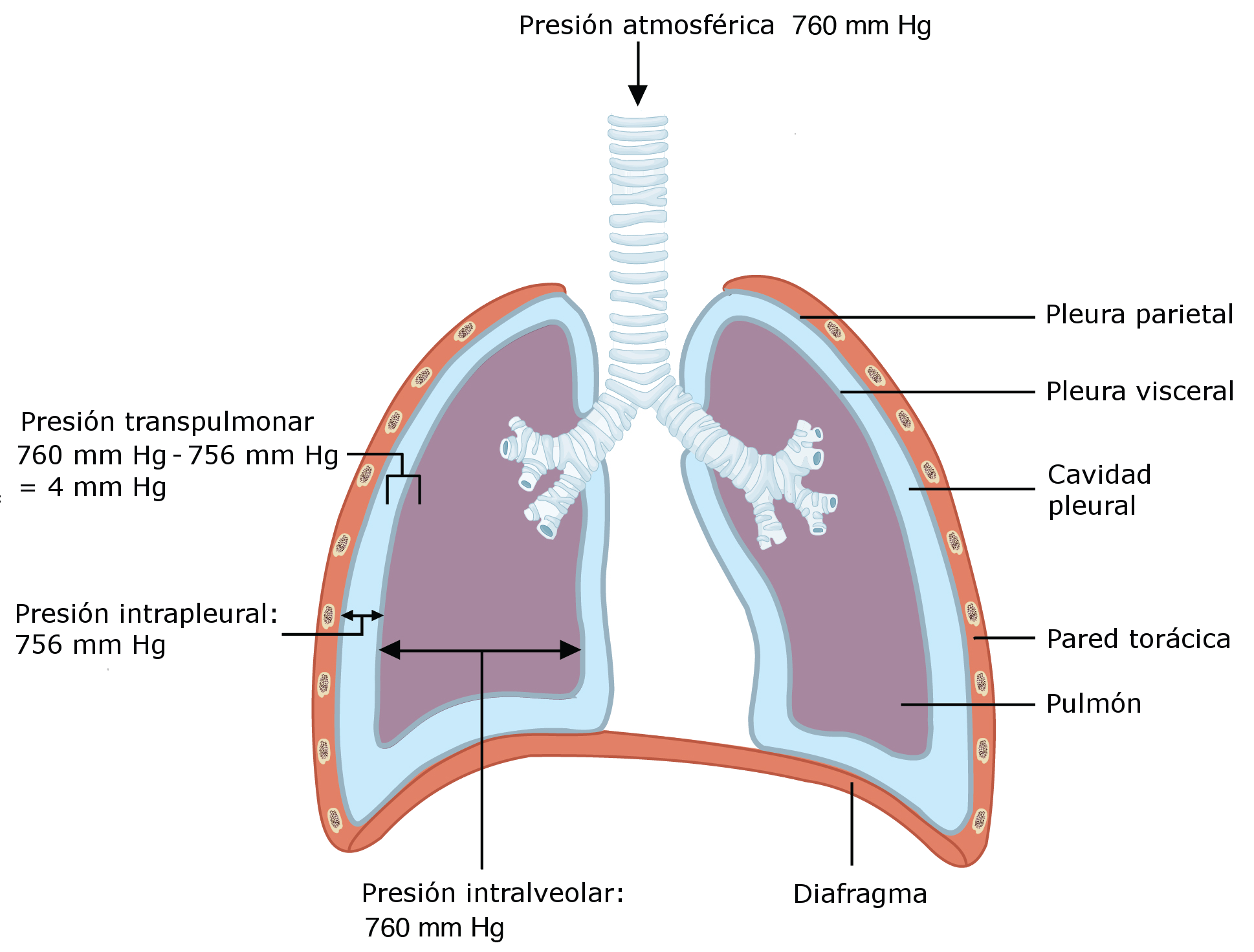 Esquema de la ventilación pulmonar indicando la presión intraalveolar e intrapleural al inicio de la inspiración.